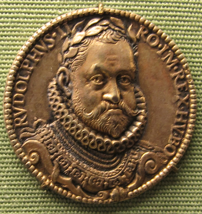 Paul van vianen, re rodolfo II, arg dorato, 1576